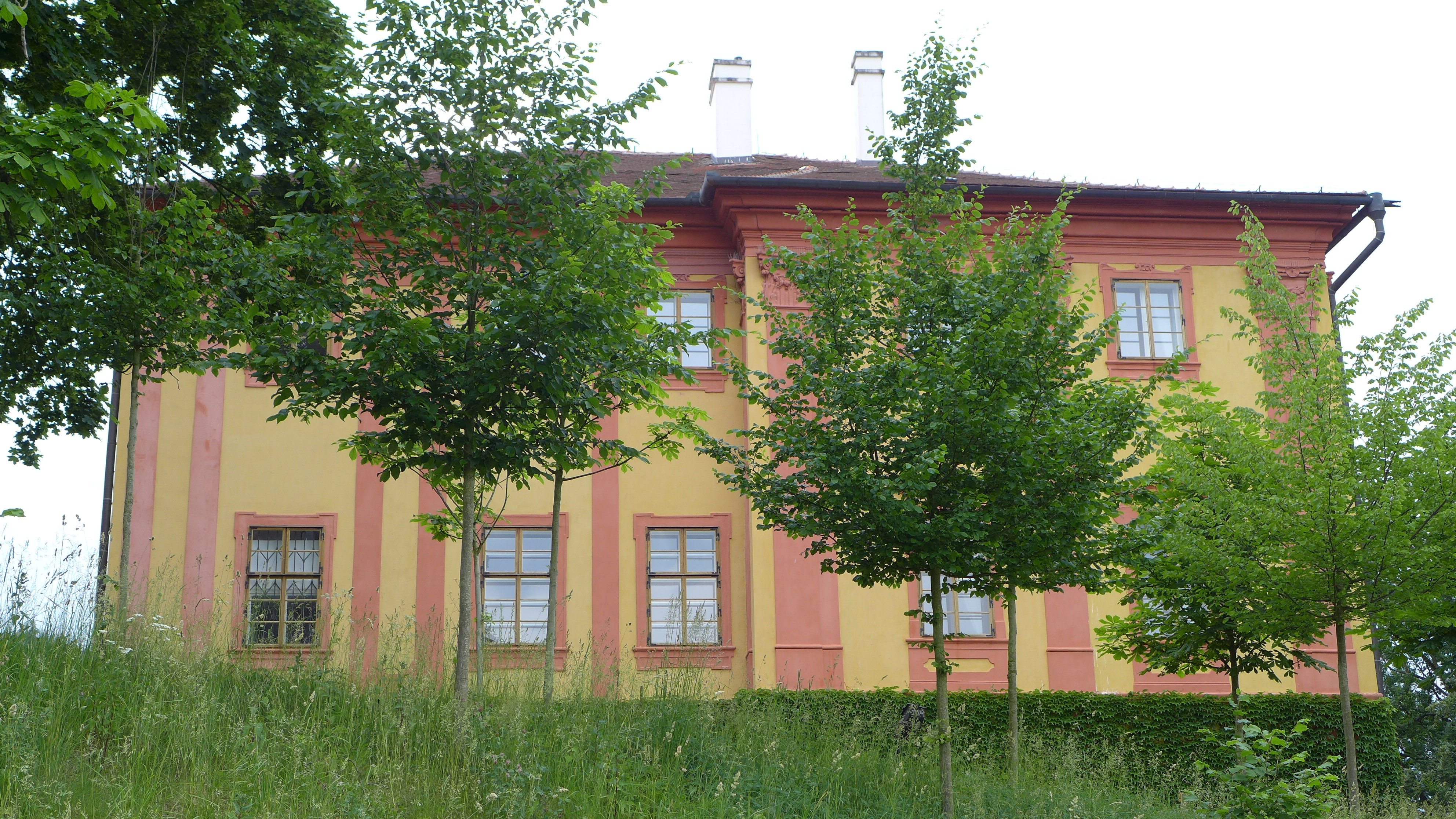 Zámek Luka nad Jihlavou, Luka nad Jihlavou 1, Luka nad Jihlavou.